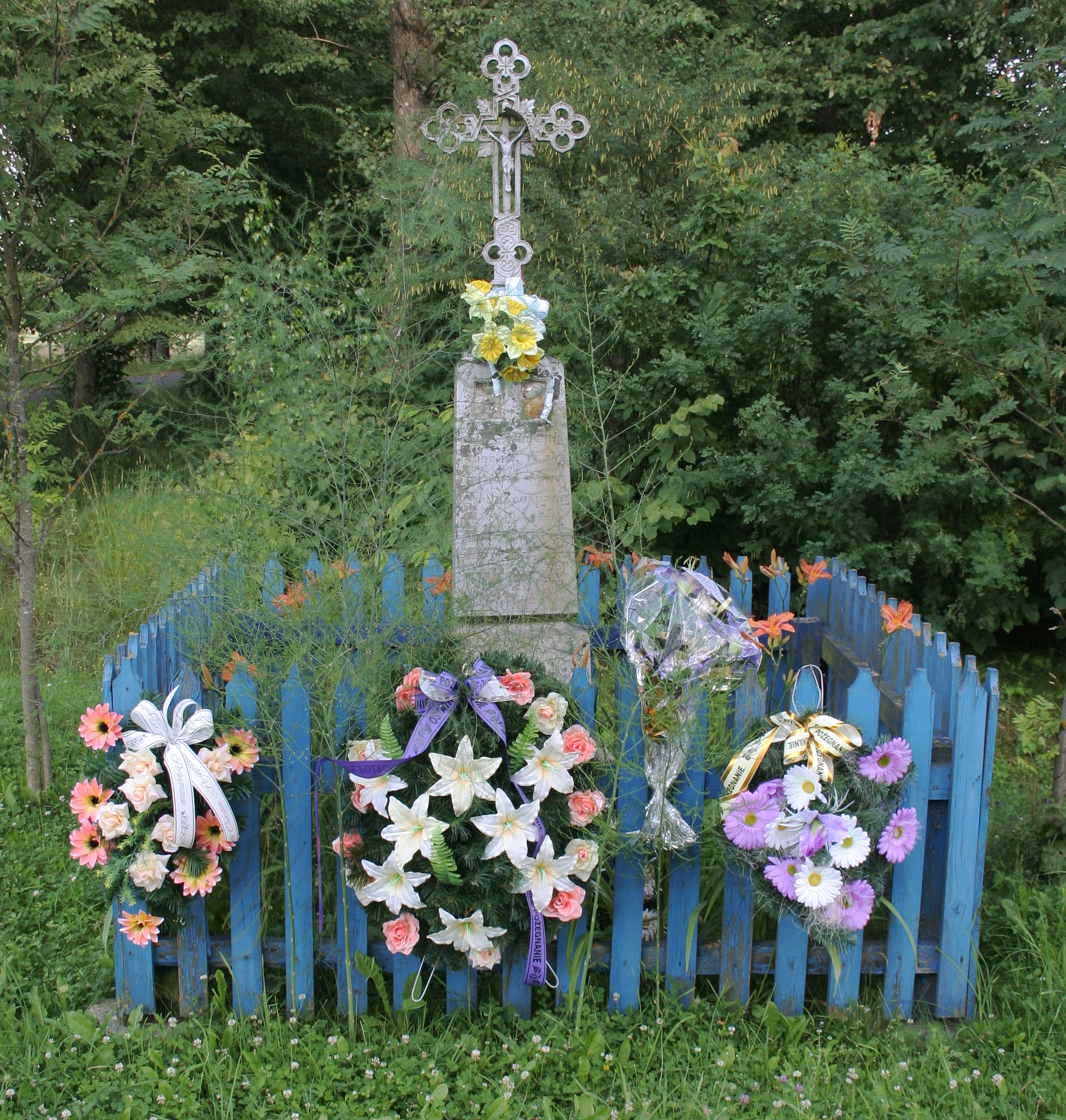 Przydrożny krzyż we wsi Eliaszuki, gmina Narewka, woj. podlaskie